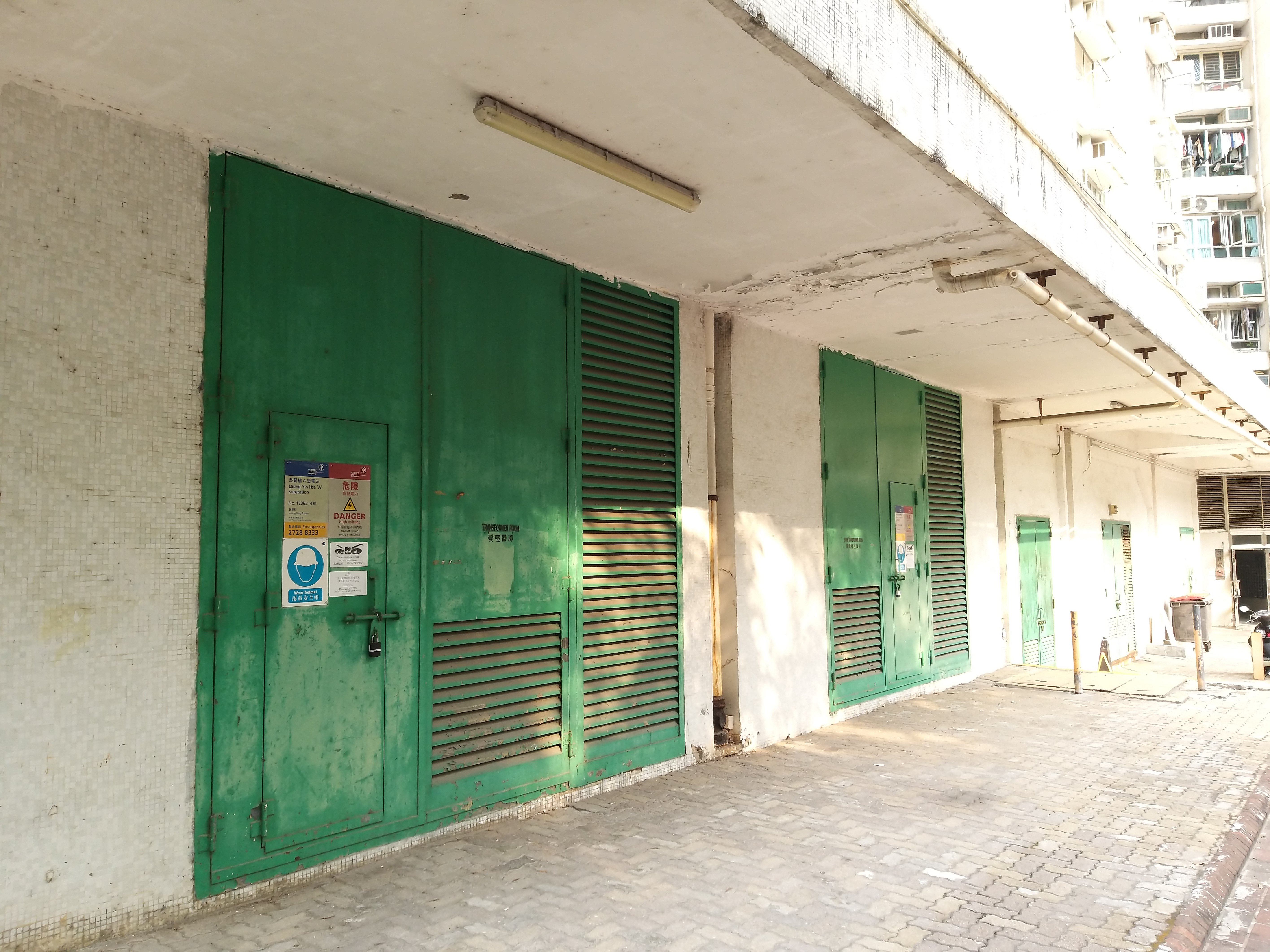 Y3型大廈的變電站